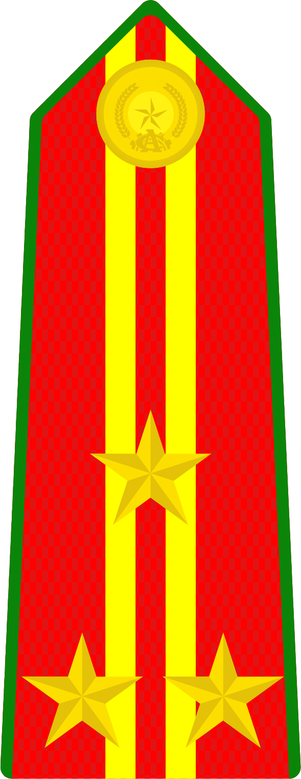 Cấp hiệu Thượng tá Công an